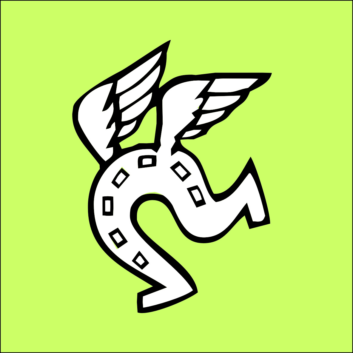 Логотип "Підкови Пегаса"